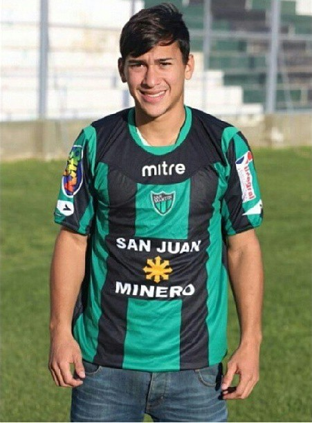 Michael Coveacon la camiseta de San Martin de San Juan